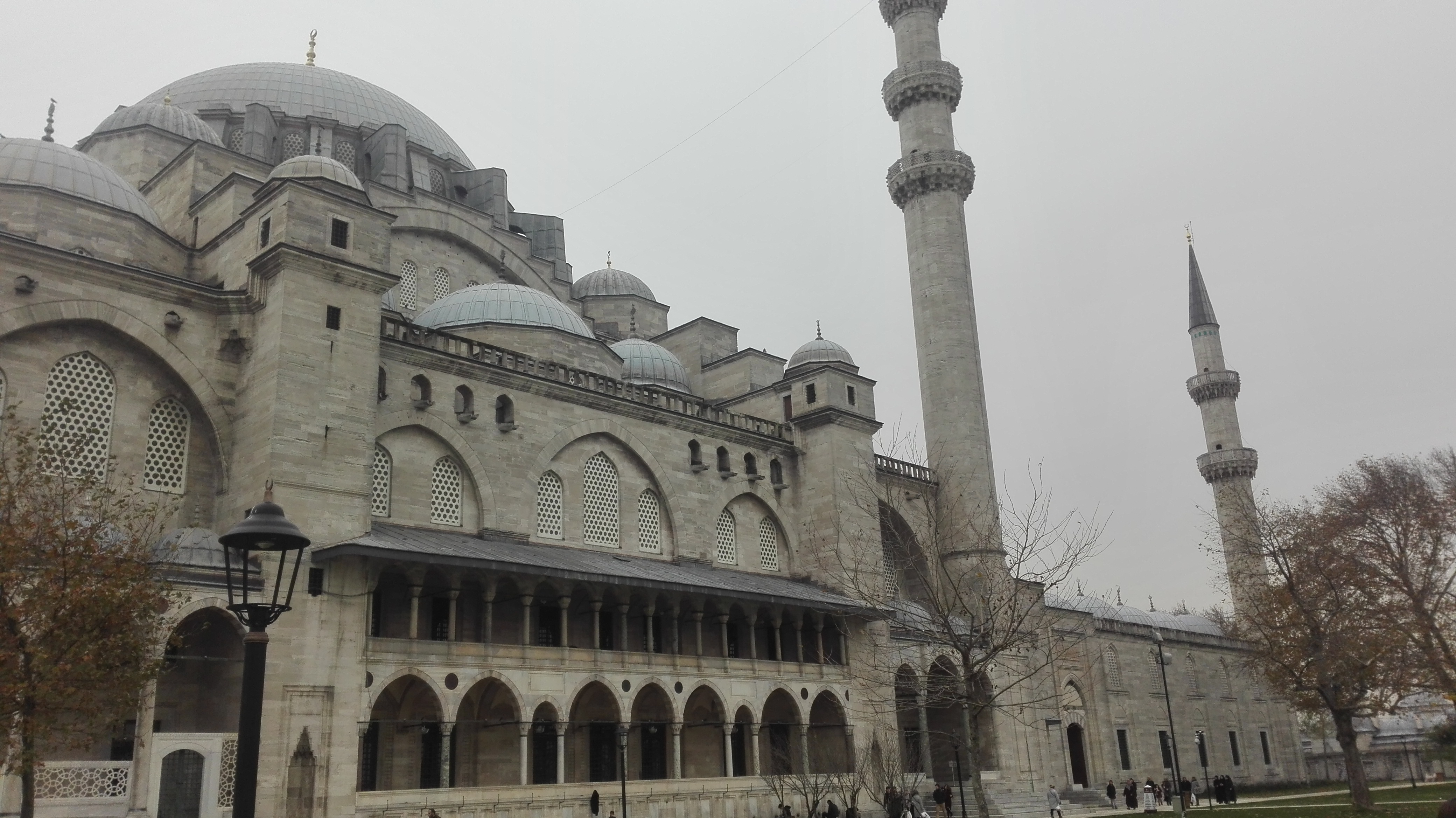 سلیمانیہ مسجد